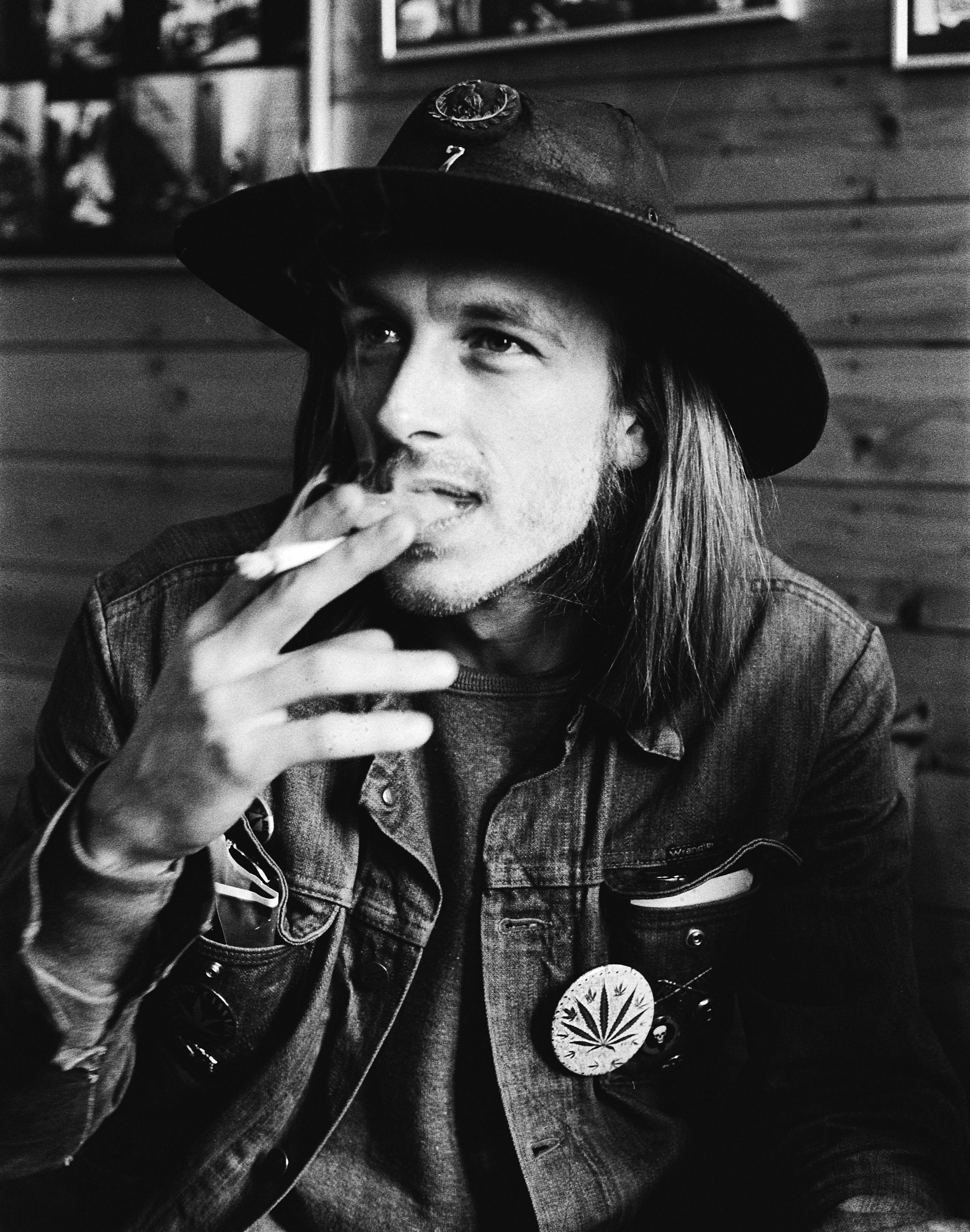 Internationale conferentie over legalisatie van hasj in Amsterdam; Koos Zwart , kop